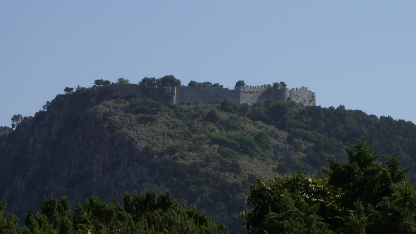 Paleokastro bei Pylos, aus Norden gesehen